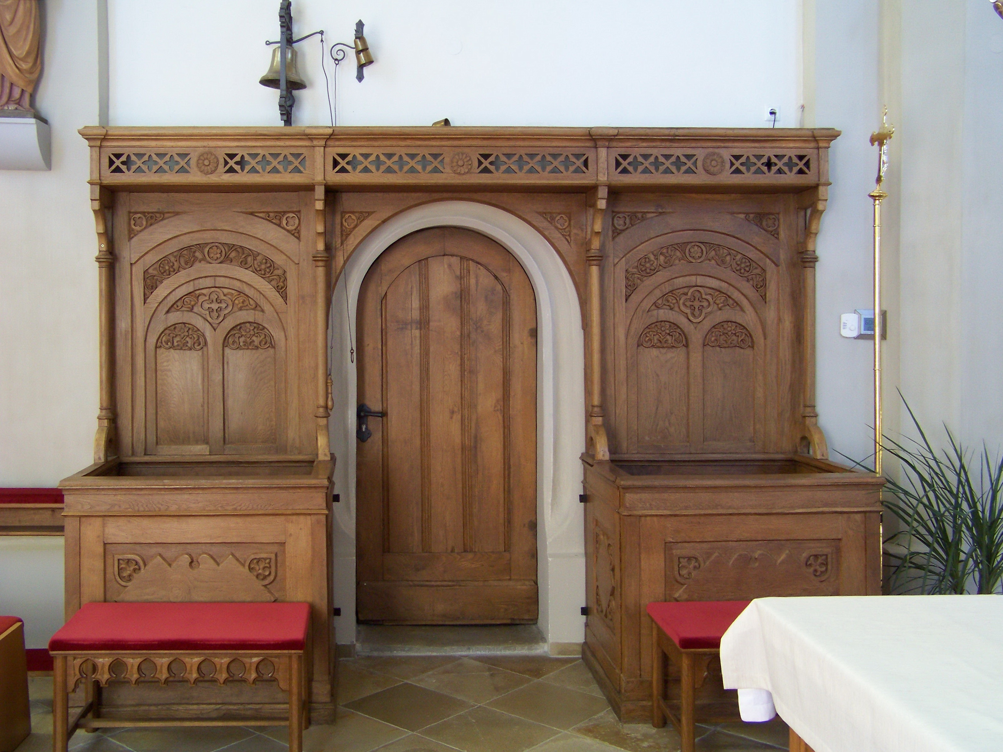 Hofkirchen 77. Katholische Pfarrkirche St. Petrus. Saalkirche im neuromanischen Stil, erbaut 1863/64. Das Chorgestühl an der Südwand des Prespyderiums wurde zur Bauzeit der Kirche angefertigt. Zwischen beiden Teilen befindet sich der rundbogige Zugang zur Sakristei. Die Außenseiten, die Rückwand und der Überbau sind mit aufgegtem, durchbrochenem Schnitzwerk mit Vierpasselementen, Rankwerk und Rosetten verziert. Die vier Plätze sind für Mesner, Ministranten und Lektoren reserviert.